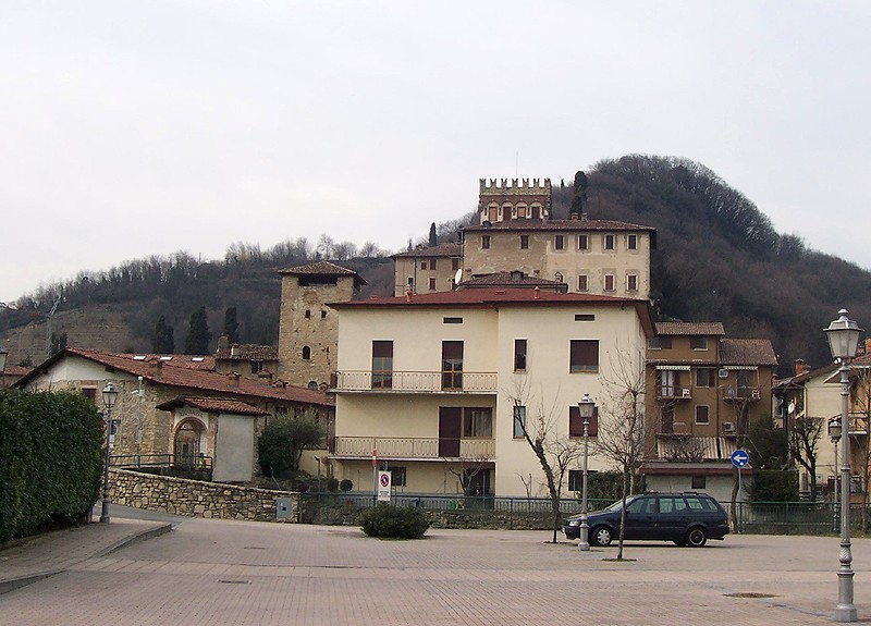 Costa di Mezzate - Panorama del Borgo Medievale